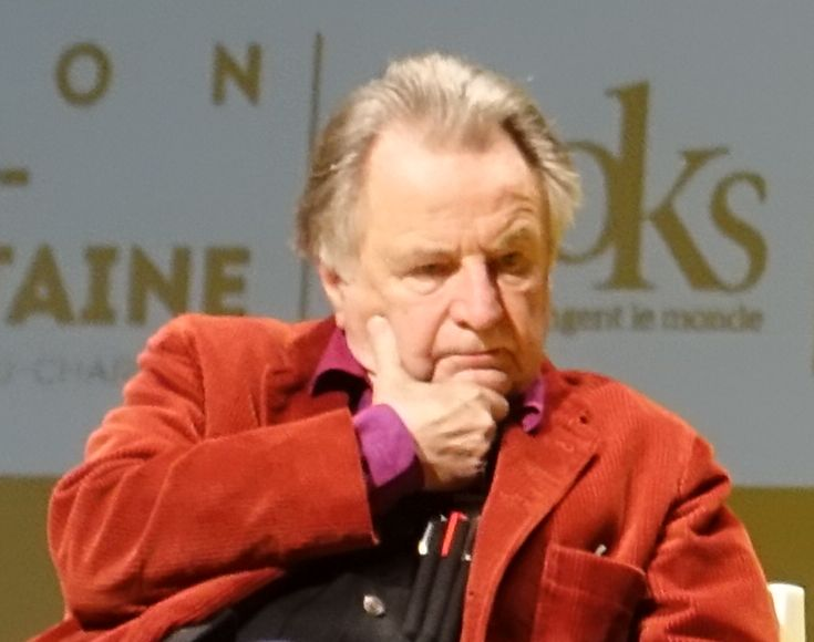 Régis Debray aux Tribunes de la Presse à Bordeaux le 24 novembre 2016